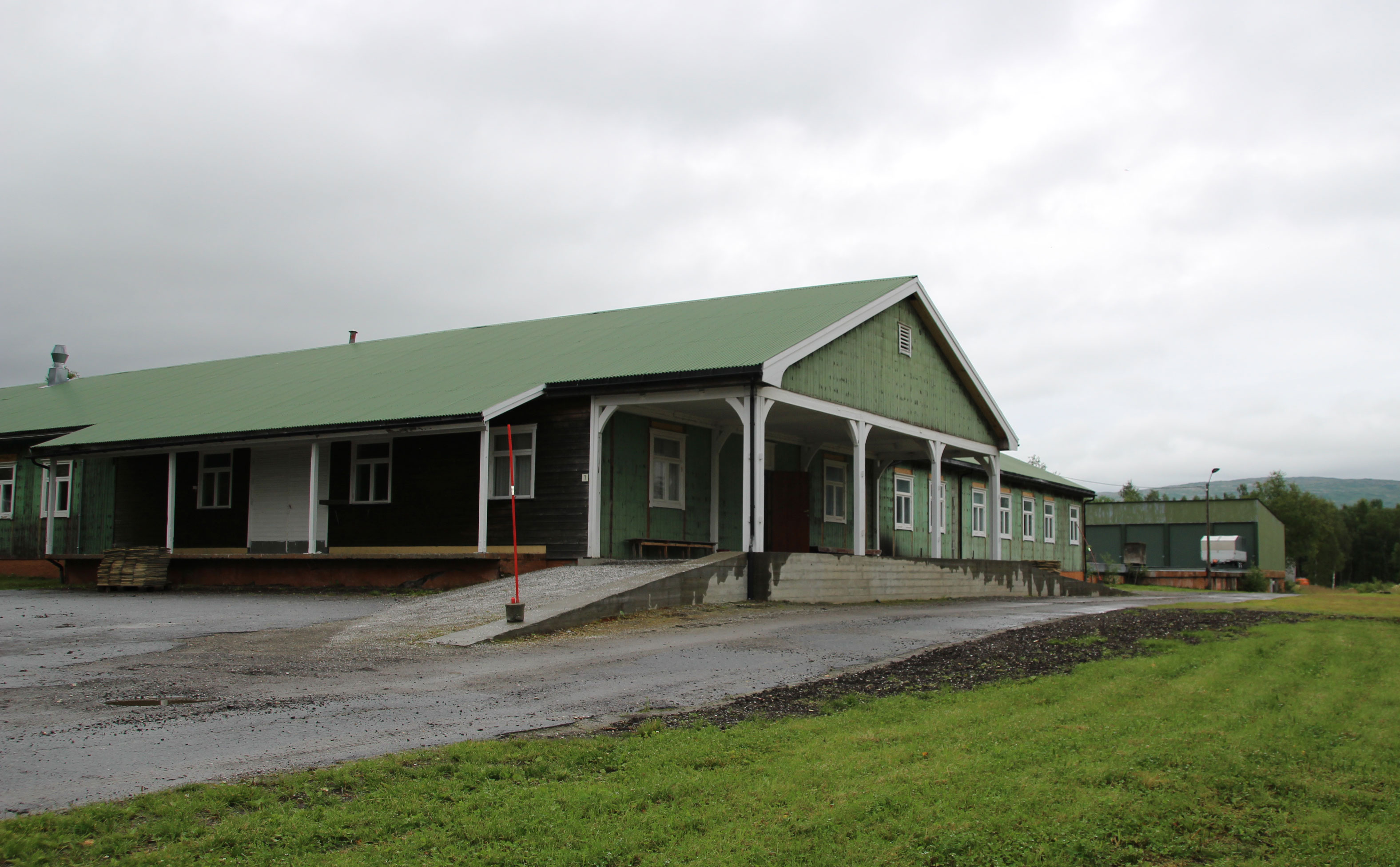 Hovedbygningen ved Klungset leir i Fauske.